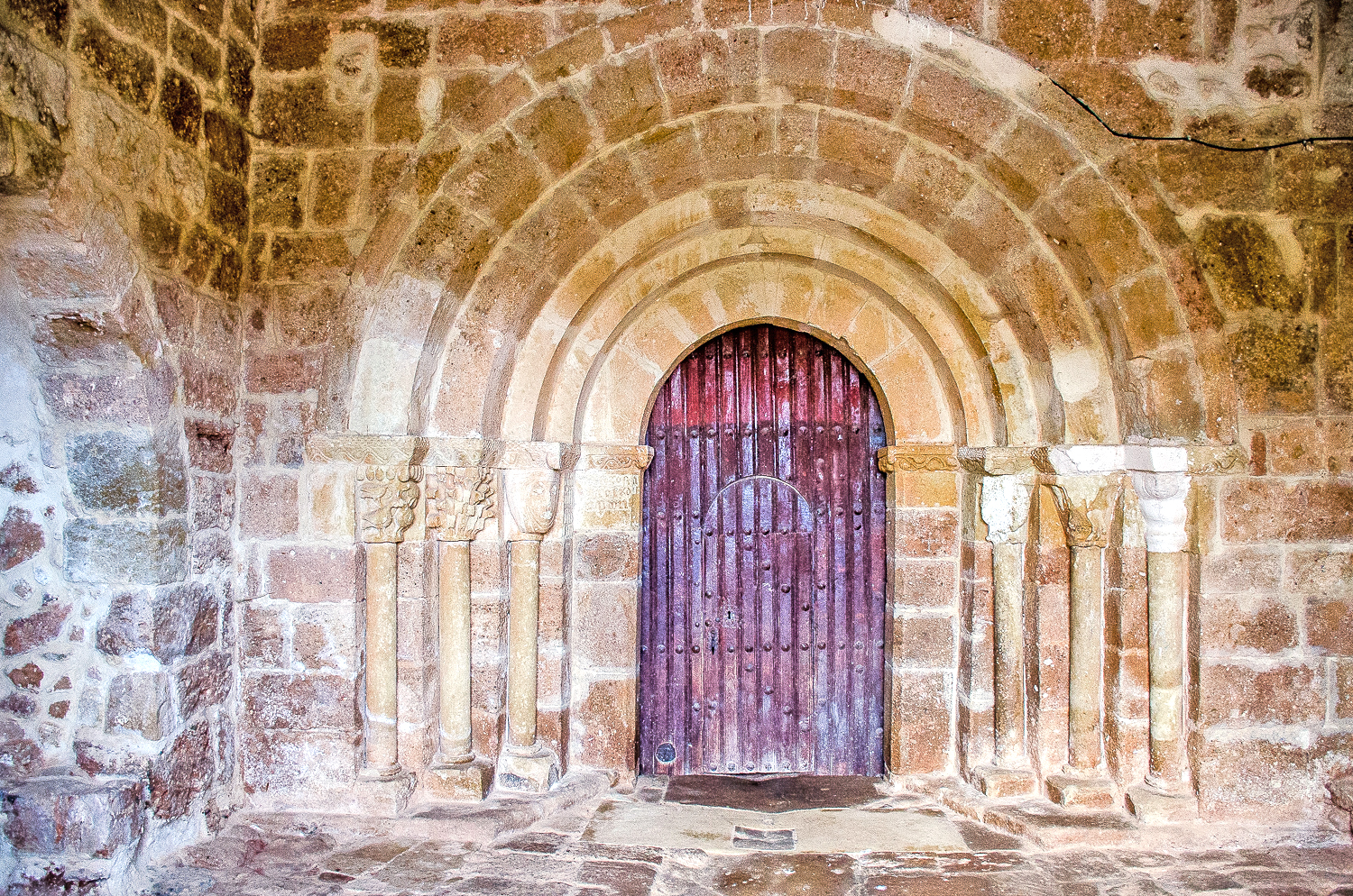 Portada de la iglesia de San Román mártir, de Quintanilla de Riofresno (Burgos - España)